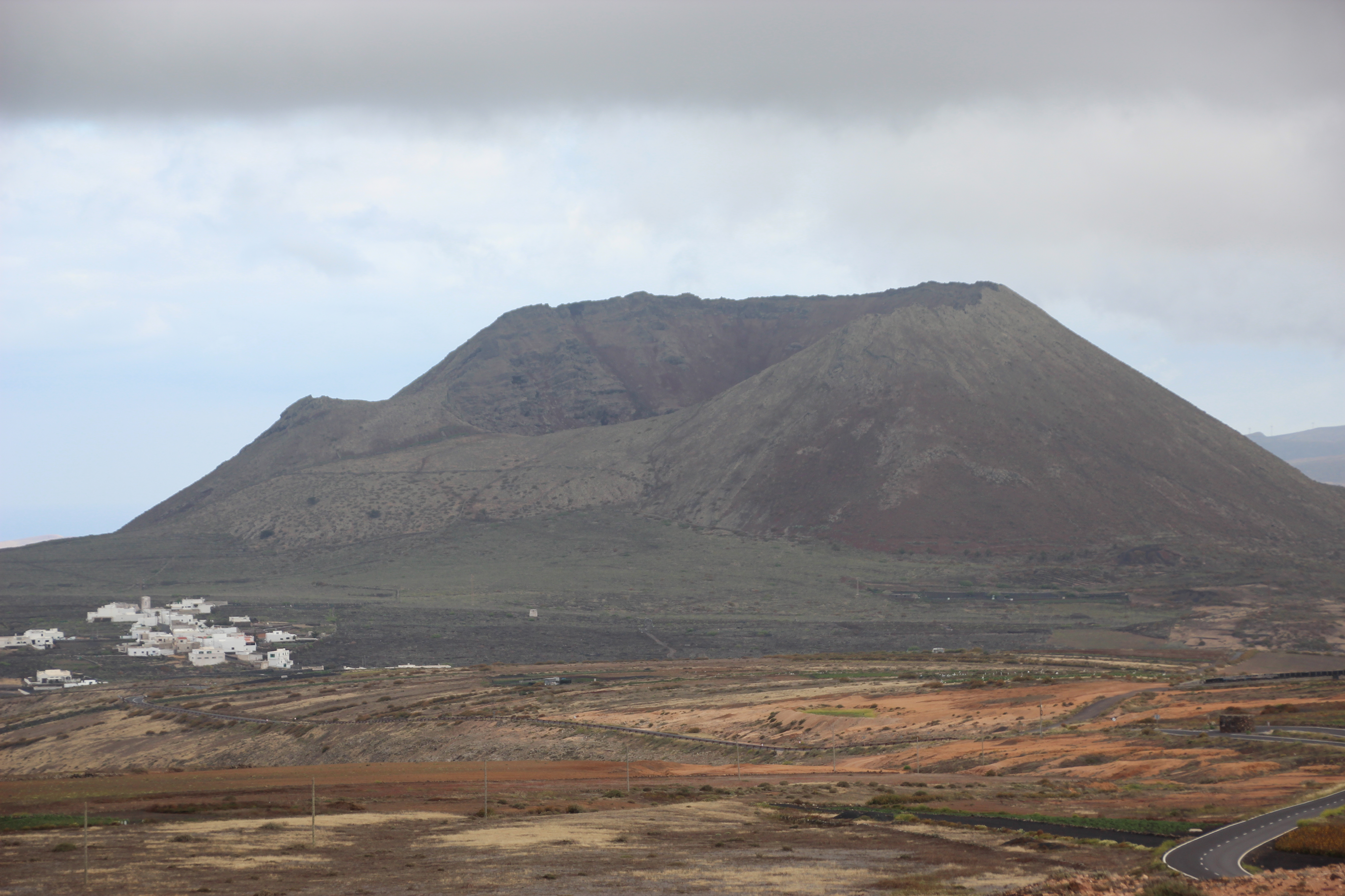 Cono volcánico de La Corona This is a photography of a Site of Community Importance in Spain with the ID: ES7010047. Natura2000 entry, EEA entry